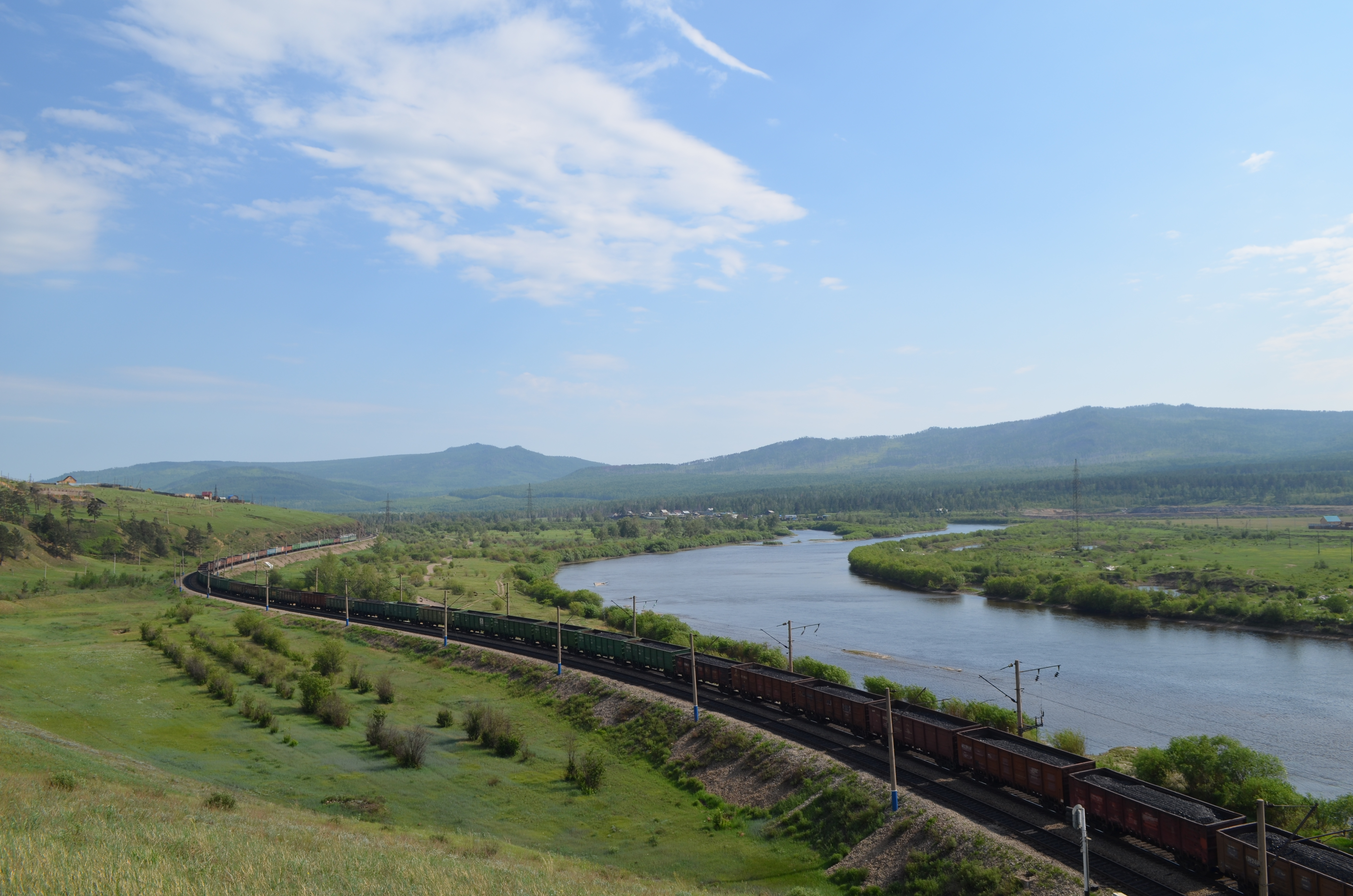 снимки конца июня - начала июля 2015 г.